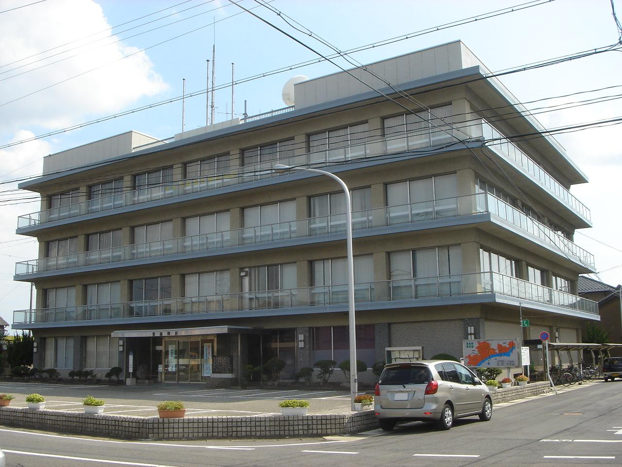 Kasamatsu Town Office(笠松町役場),Kasamatsu,Gifu,Japan(岐阜県笠松町)で撮影